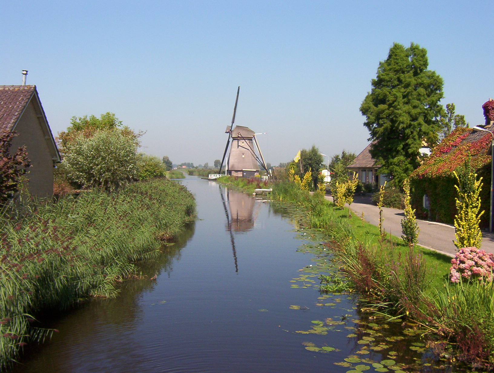 Achtkantige poldermolen met scheprad in Goudriaan. Eigen foto, augustus 2005